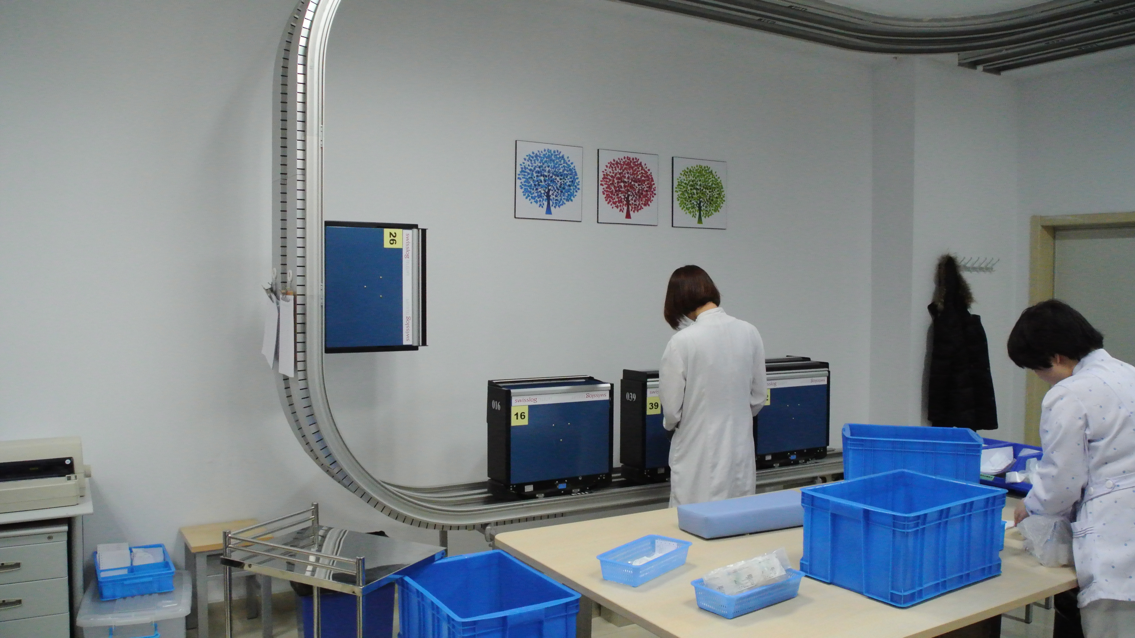 Telelift Station in Krankenhausapotheke